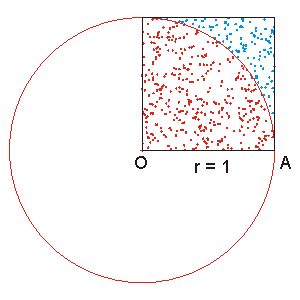 Ilustração do Método Estatístico para o Cálculo de Pi por Monte-Carlo